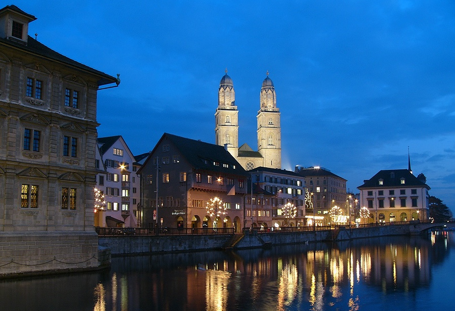 Bild des Zürcher Grossmünsters (mit dem Rathaus links im Bild) im Dezember 2004